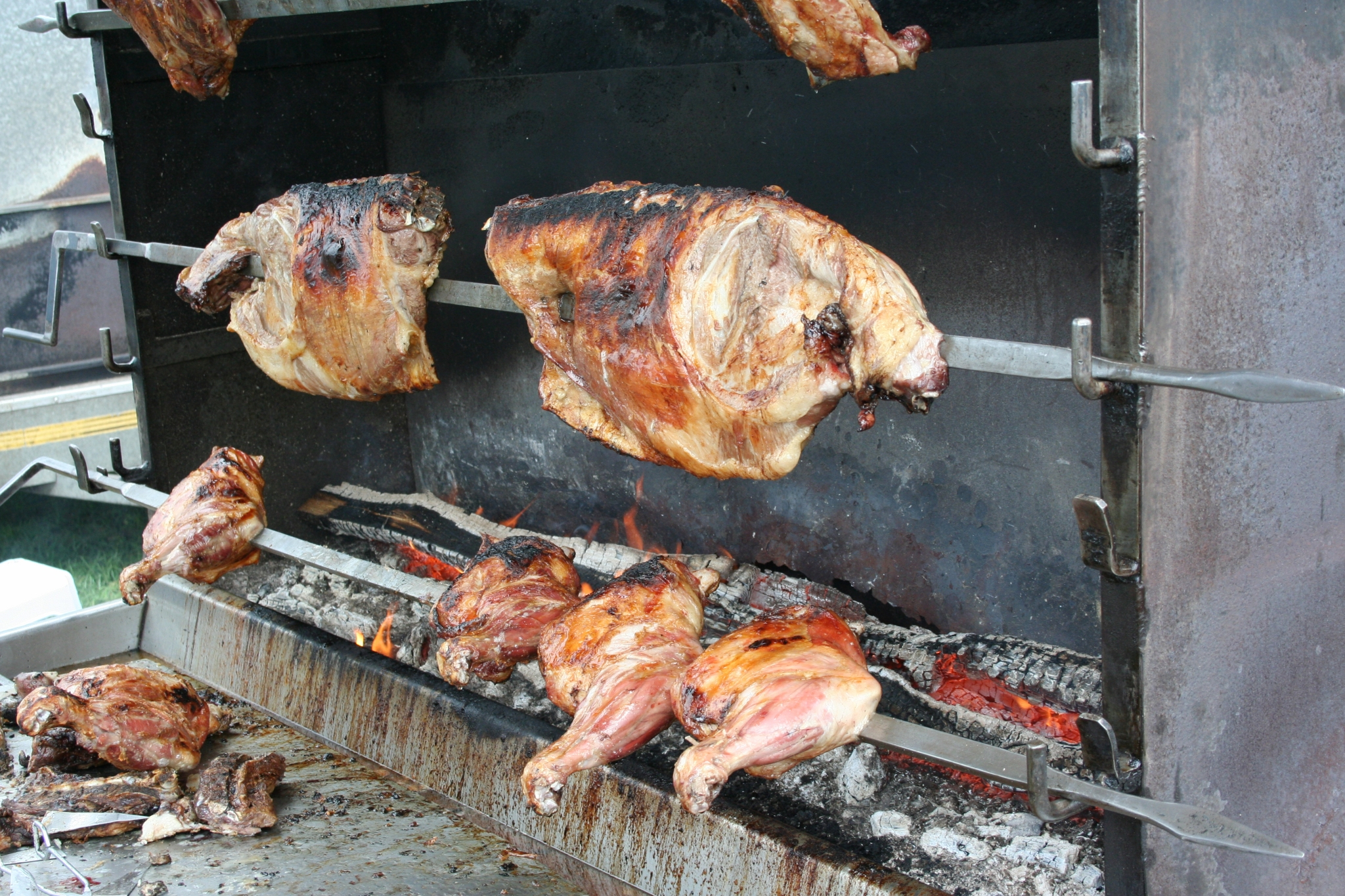 Rotissoire à gigot dans l'allée des rotisseurs à la foire de Lessay - Manche - France